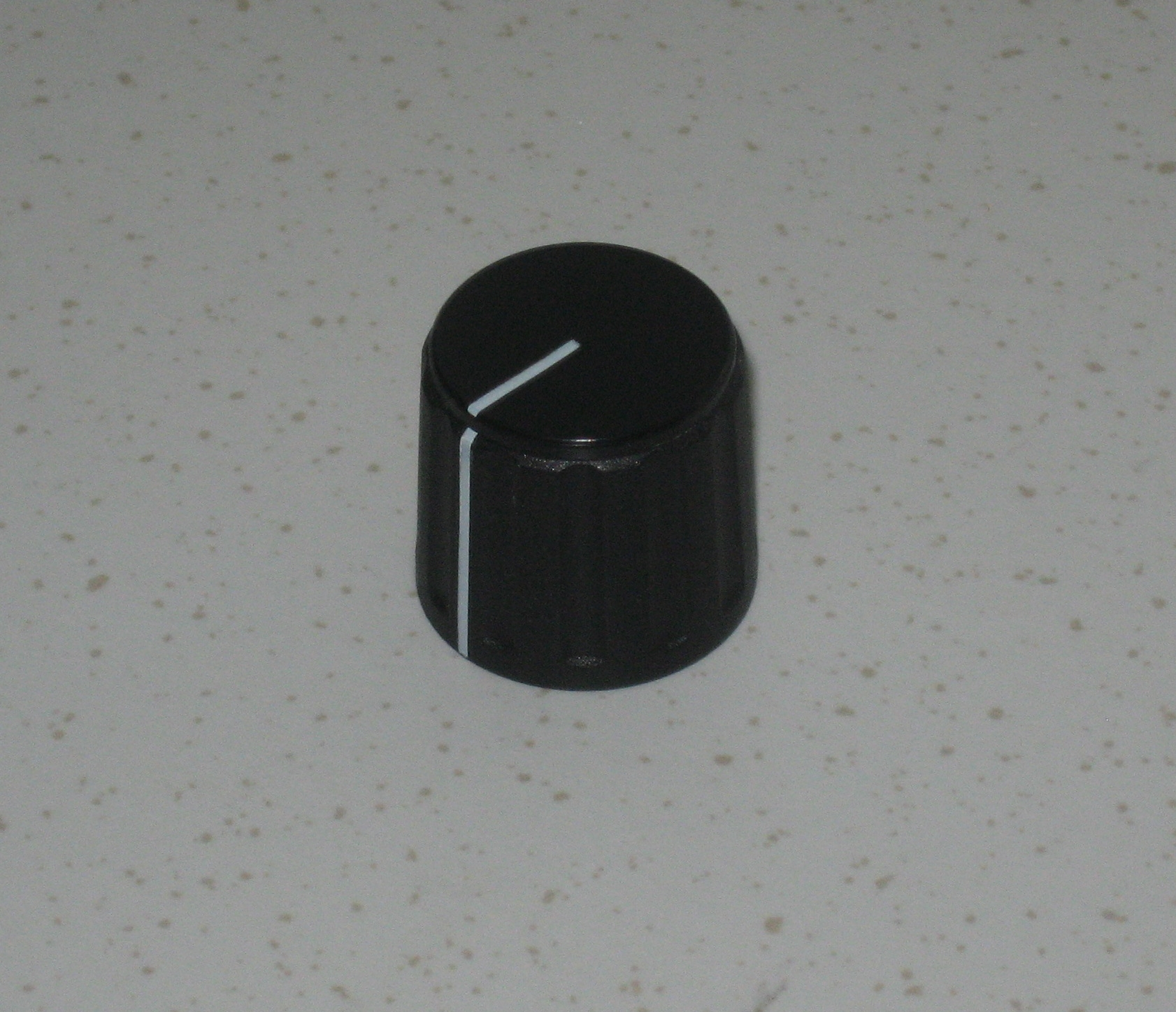 Potentiometrin tai kiertokytkimen nuppi